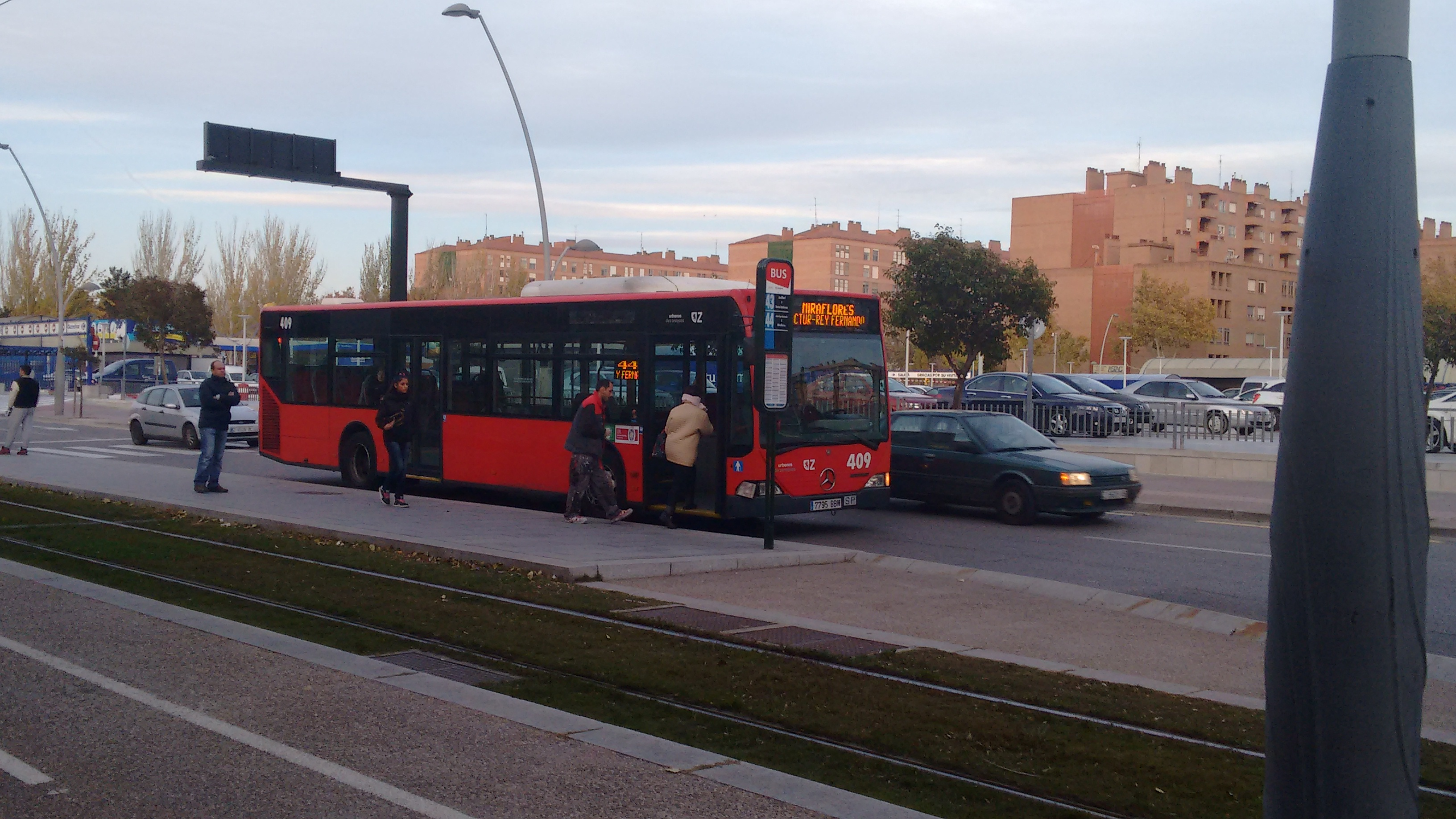 Autobús de la línea 44 de Auzsa, prestando servicio en la Avenida de Gómez Gertrudis de Avellaneda.